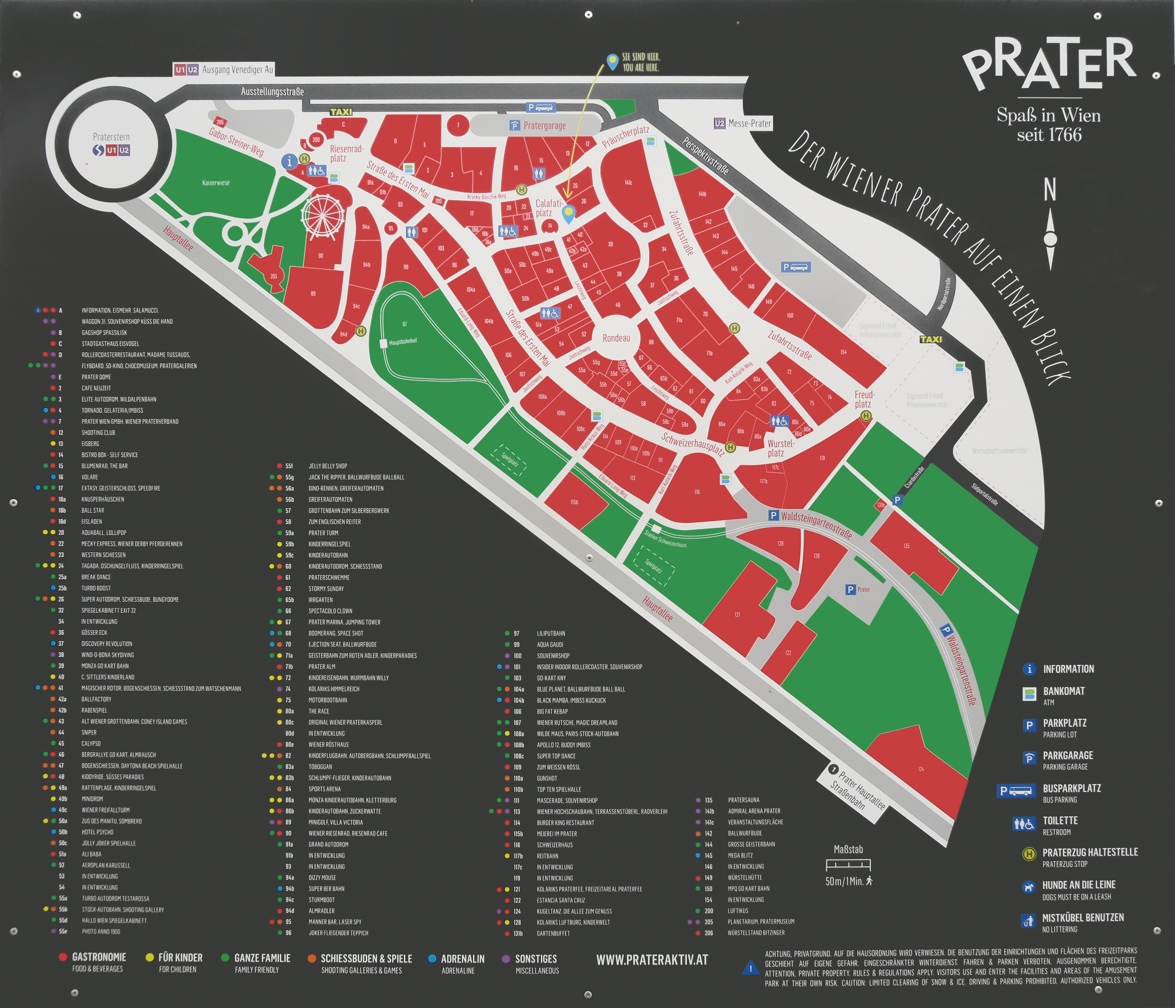 Karte des Wurstelpraters